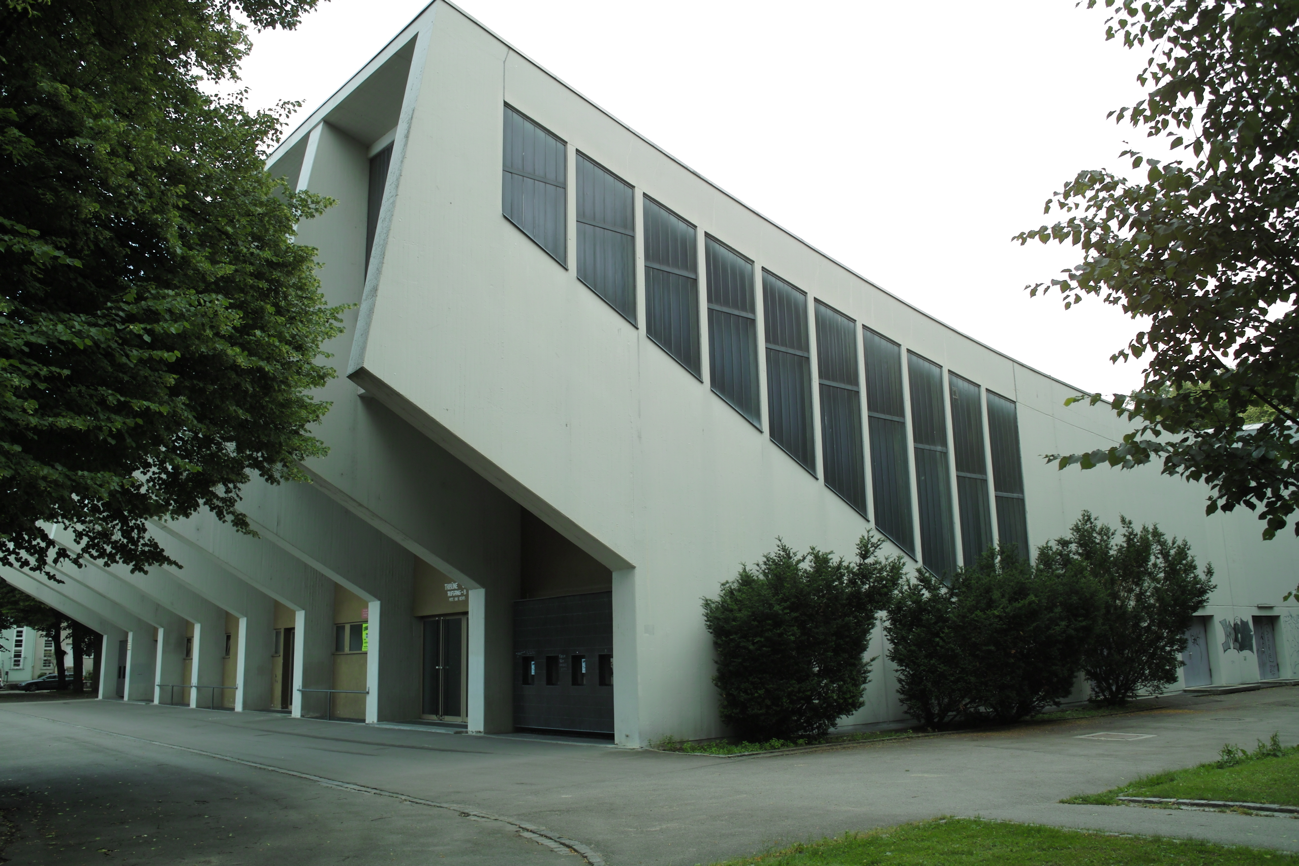 Augsburg-Antonsviertel: Sporthalle Augsburg, Ansicht von Norden.